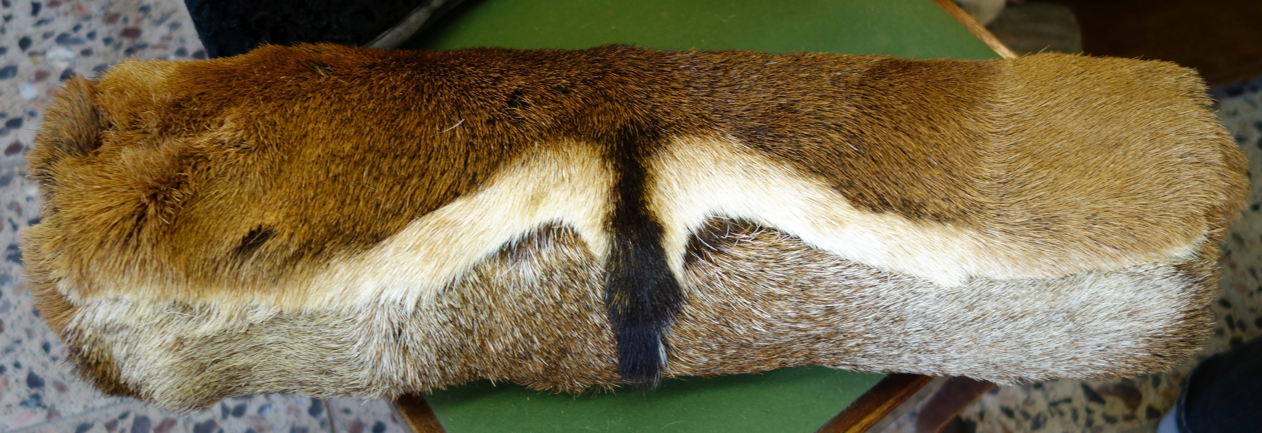 Muffel (Mufflon) -Nackenrolle. Gesehen bei der Kürschnerei und Pelz-Zurichterei Udo Meinelt, Rötha.